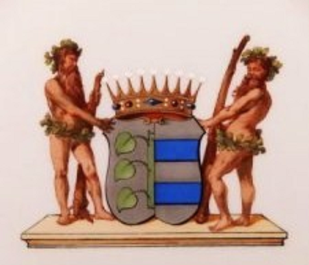 Wappen der Grafen Schimmelmann (Graf Ernst (* 1820 in Altona; † 1885 in Ahrensburg), königlich preußischer Wirklicher Geheimrat, Mitglied des Preußischen Herrenhauses)